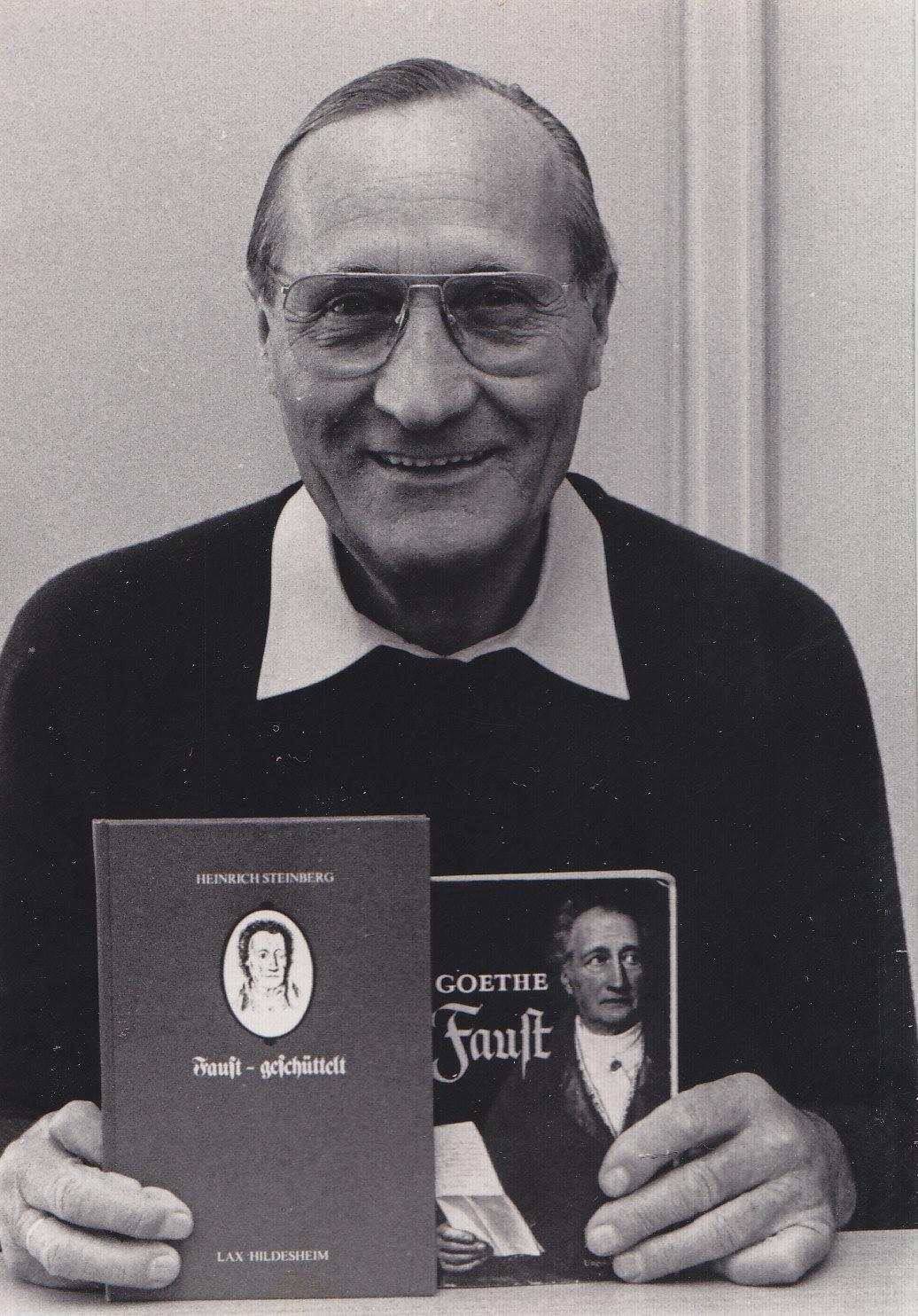 Schüttelreim-Autor Heinrich Steinberg 1984